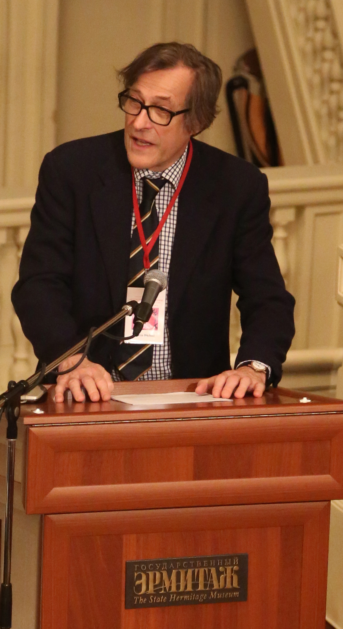 Профессор Мартин Бюхсель во время пленарного заседания конференции "Актуальные проблемы теории и истории искусства" 2014 г.